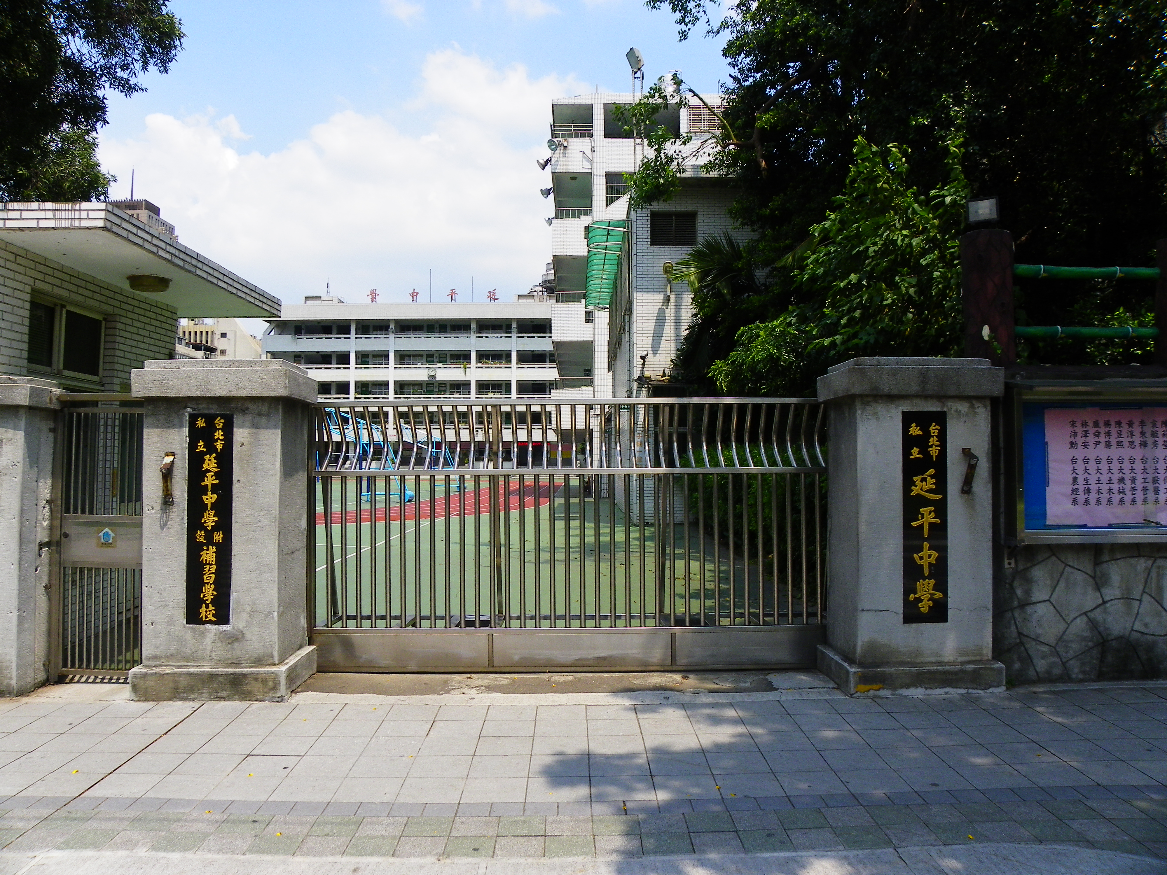 臺北市私立延平高級中學正門。